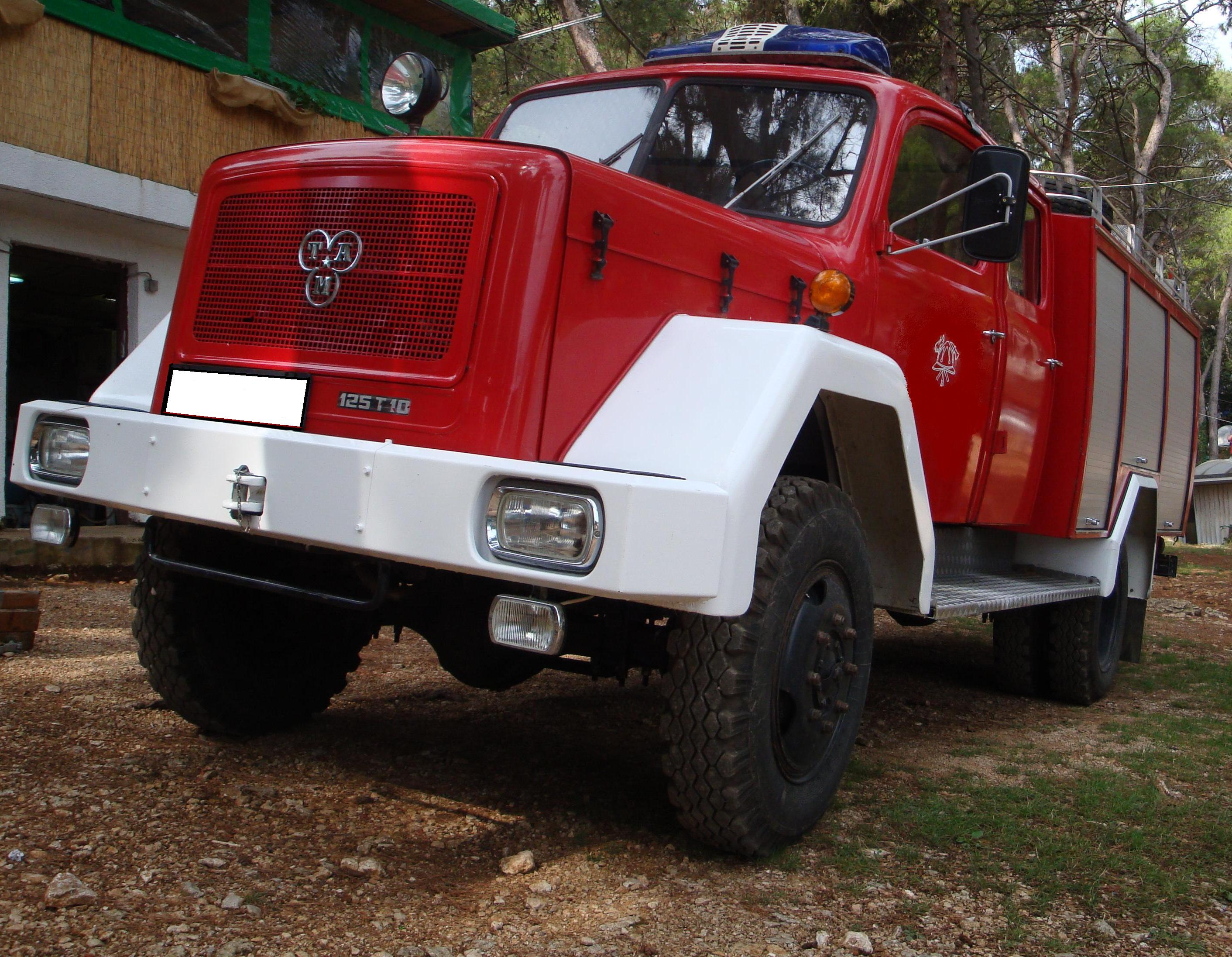 Gasilski tovornjak TAM 125T10, slikano v kampu Tašalera, Premantura, Istra